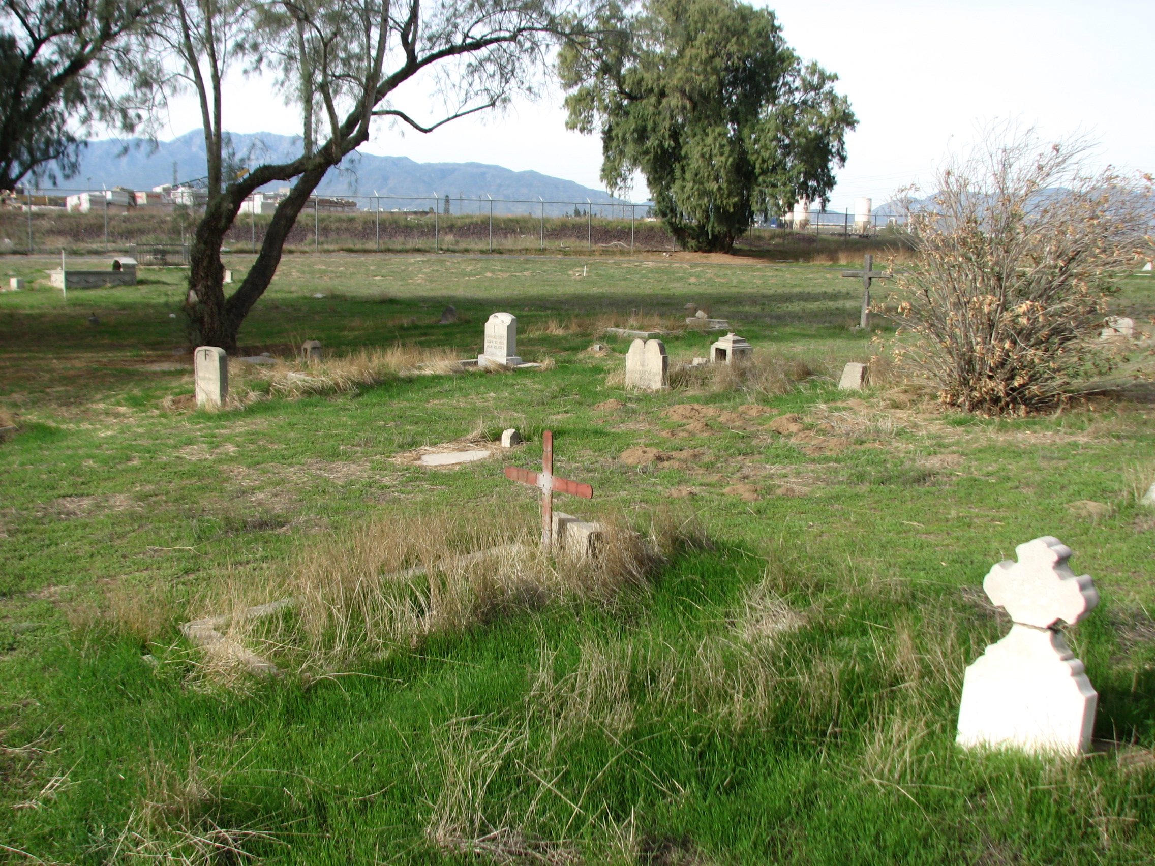 varied 919